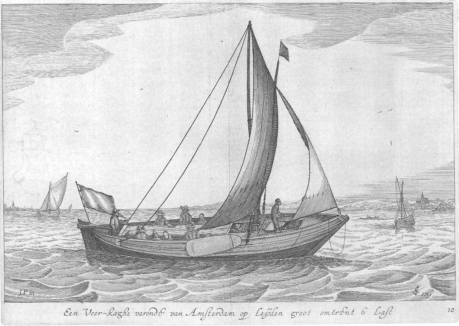 Ein Fähr-Kaag, etwa 6 Lasten groß, nach Porcellis 1627